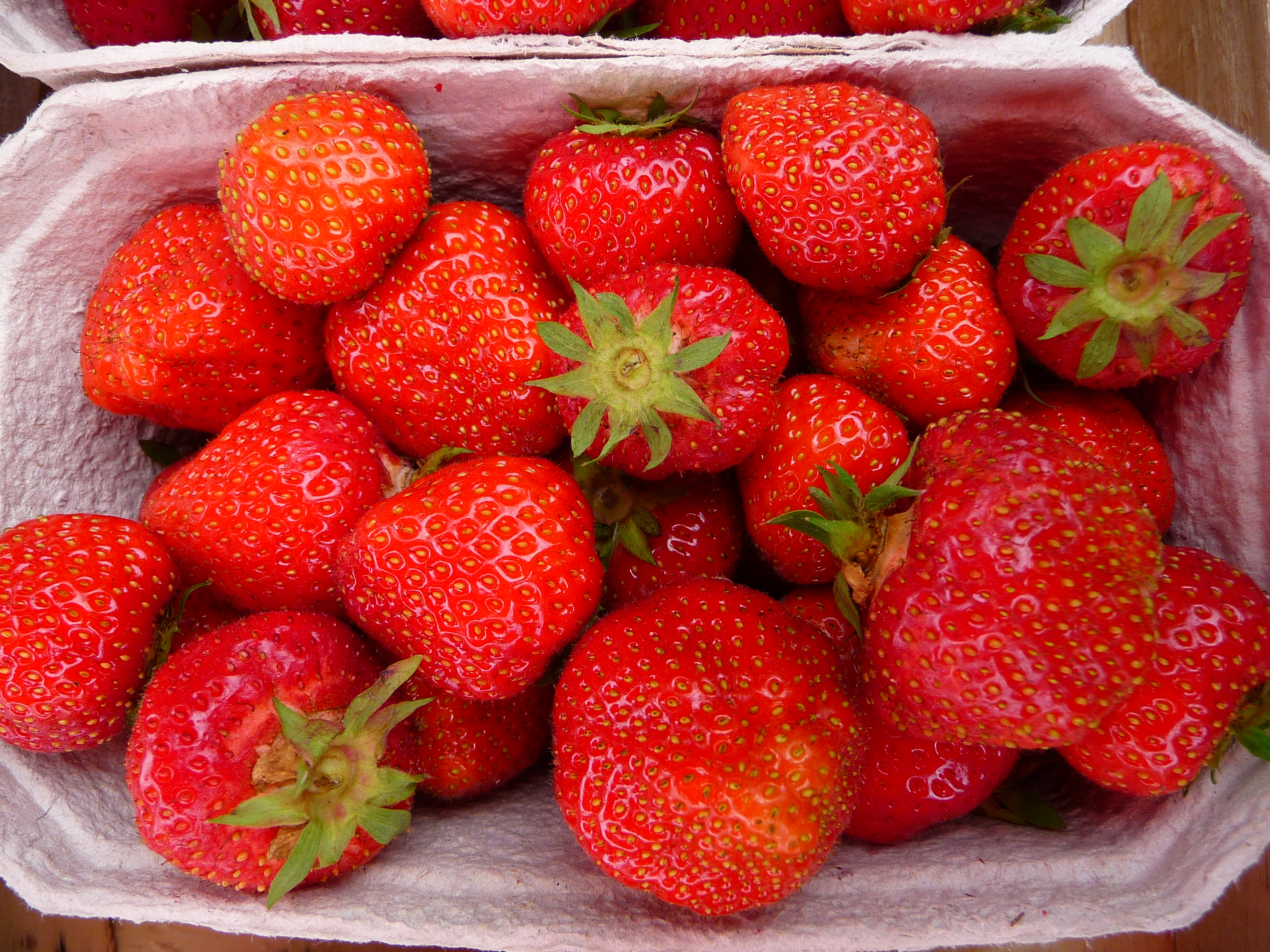 Schälchen mit Erdbeeren "Senga Sengana" (Fragaria)